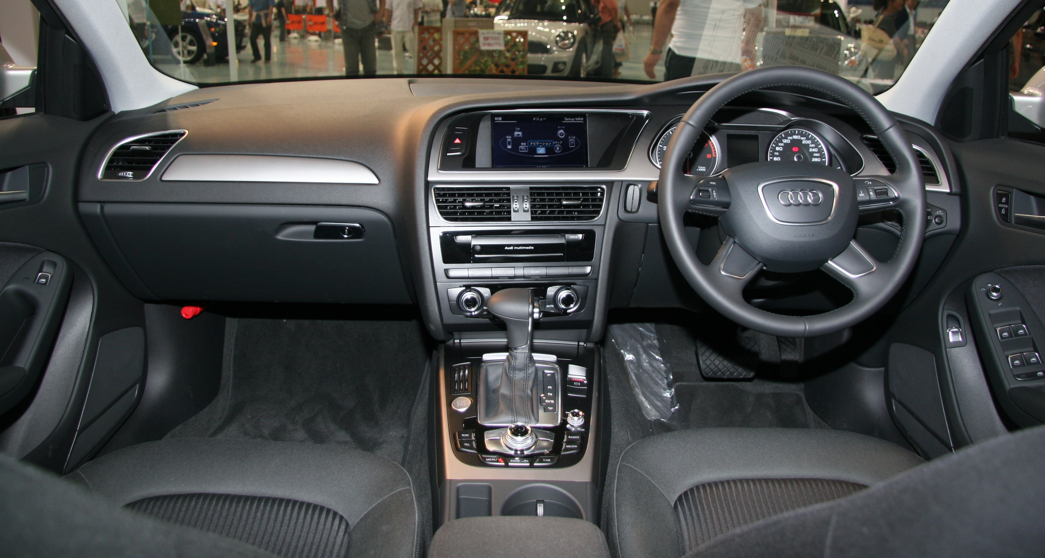 Audi A4 FF